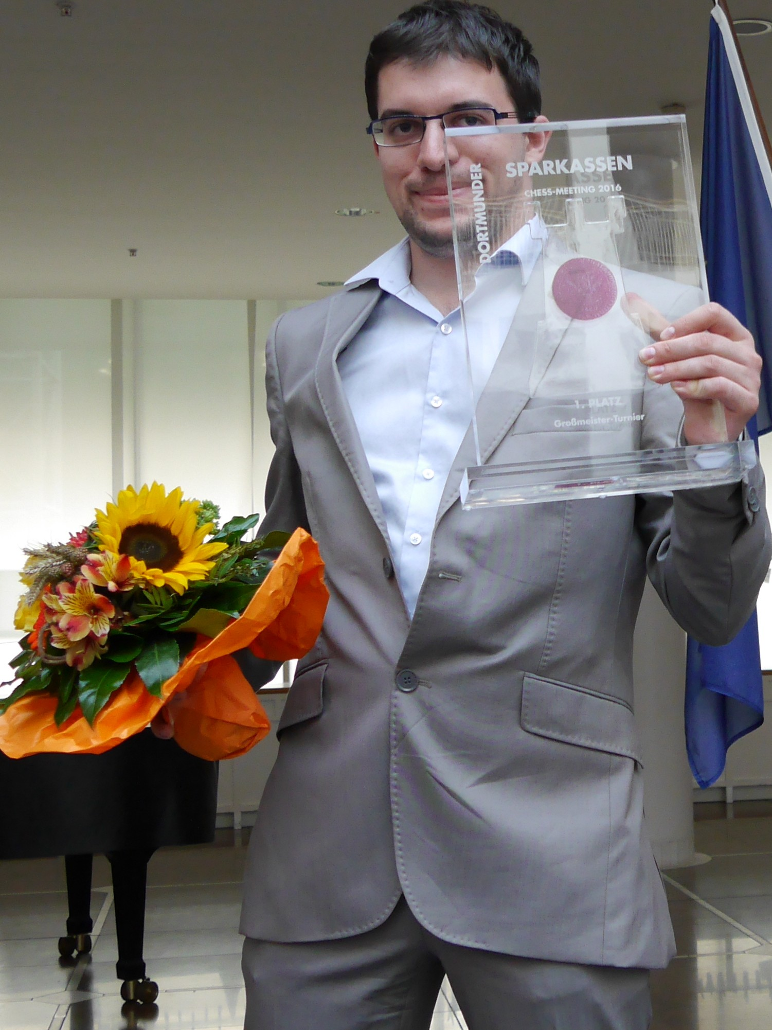 Maxime Vachier-Lagrave, Sieger der Dortmunder Schachtage 2016, nach Ehrung im Dortmunder Rathaus.